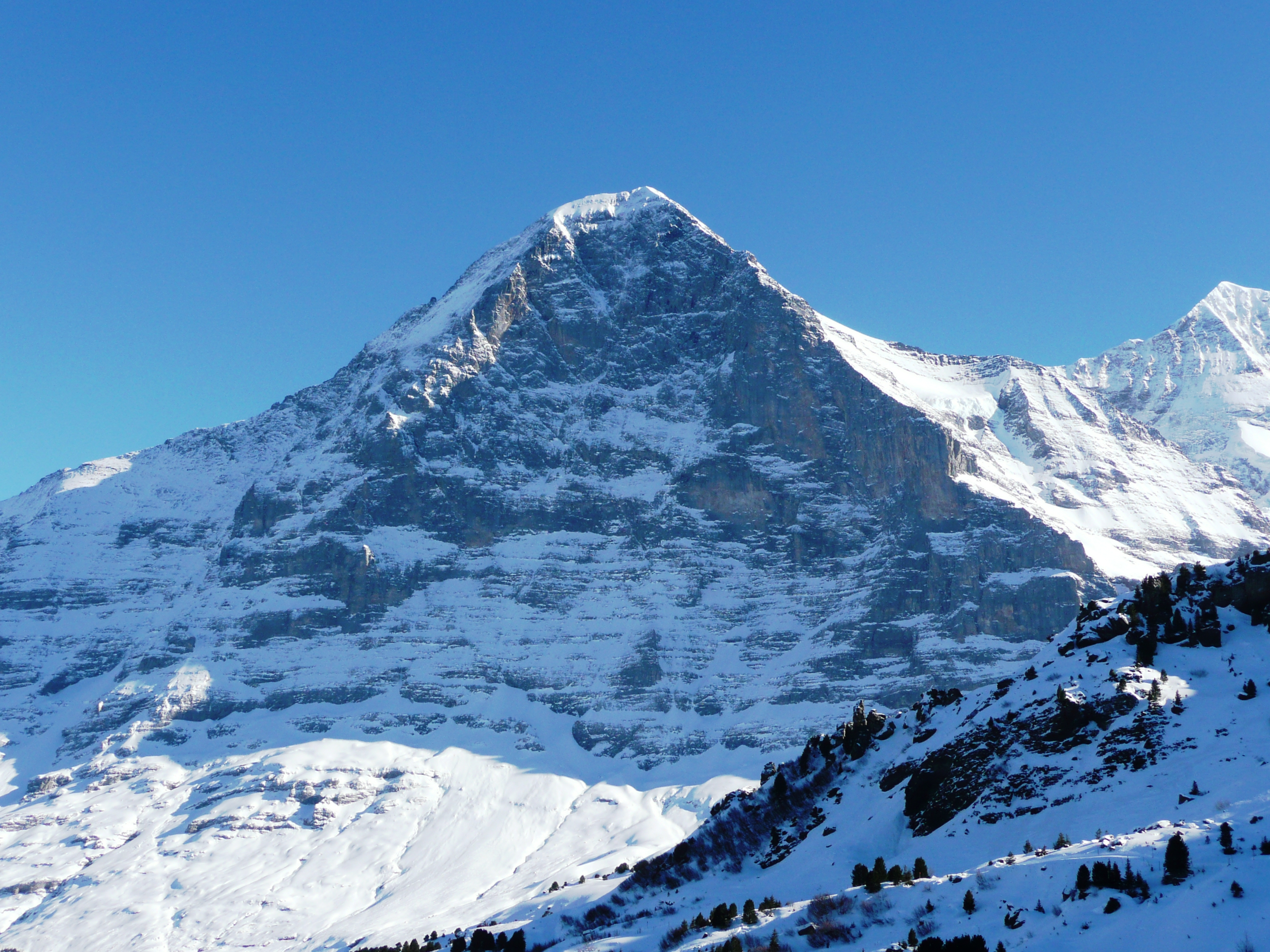 Eiger Nordwand